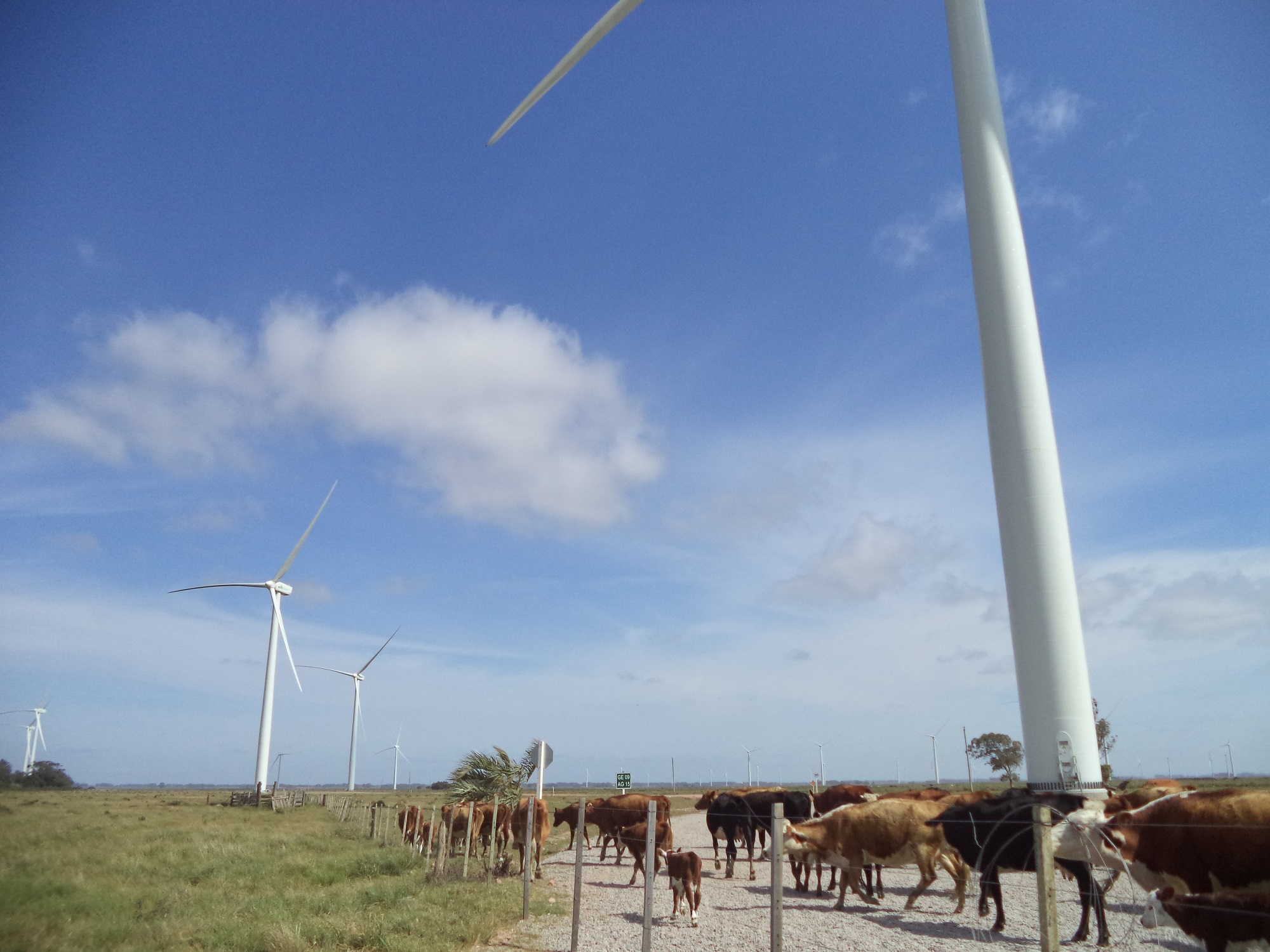 Aerogeradores no parque eólico Geribatu.